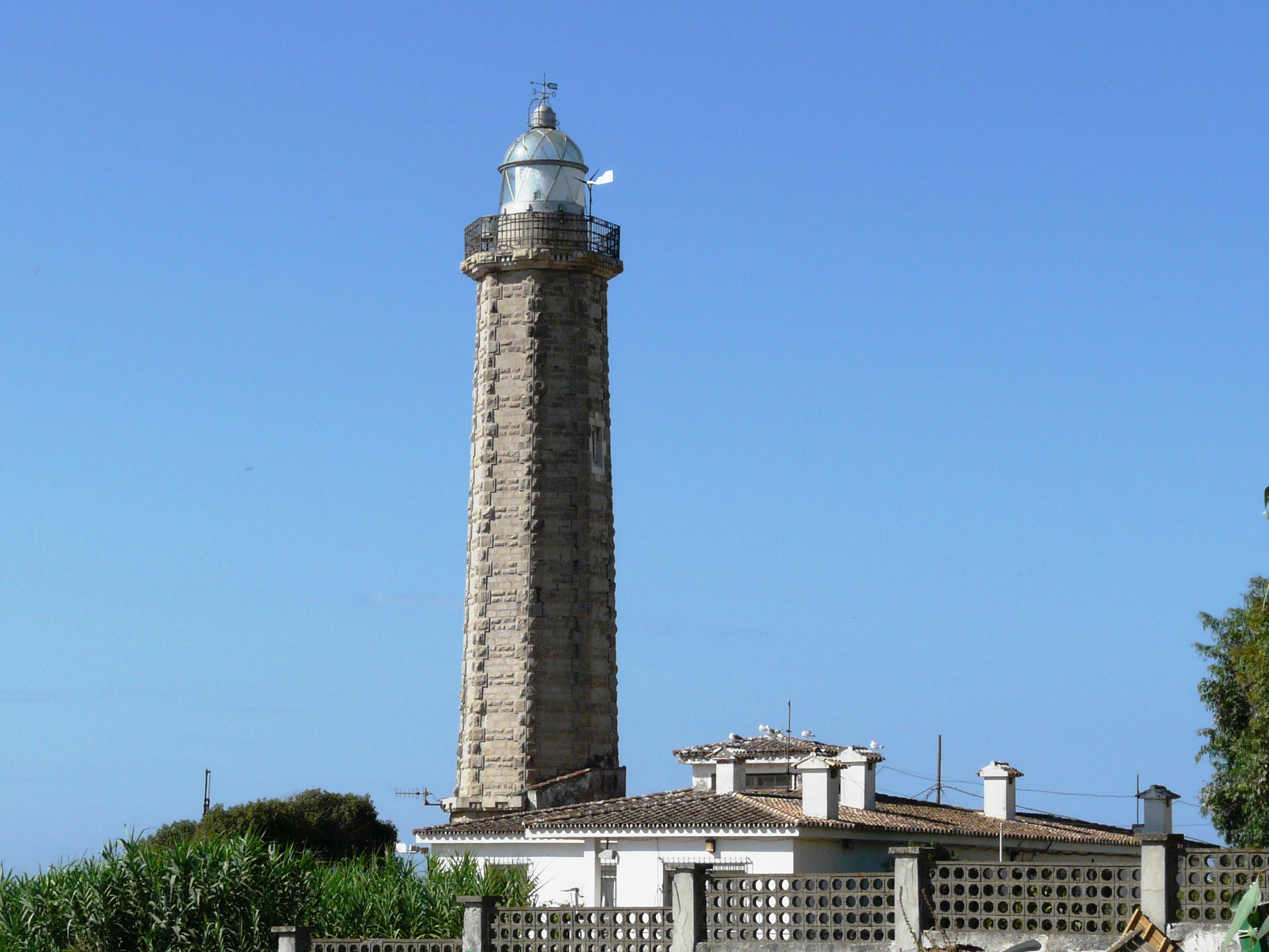 Faro de Punta Doncella (Estepona) - lado Este